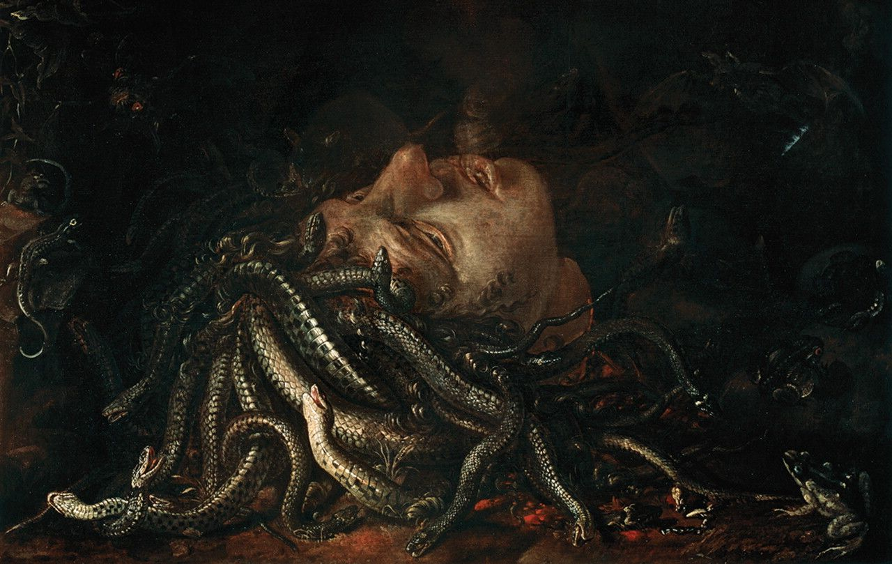 formerly attributed to Leonardo da Vinci. See Medusa (Leonardo).